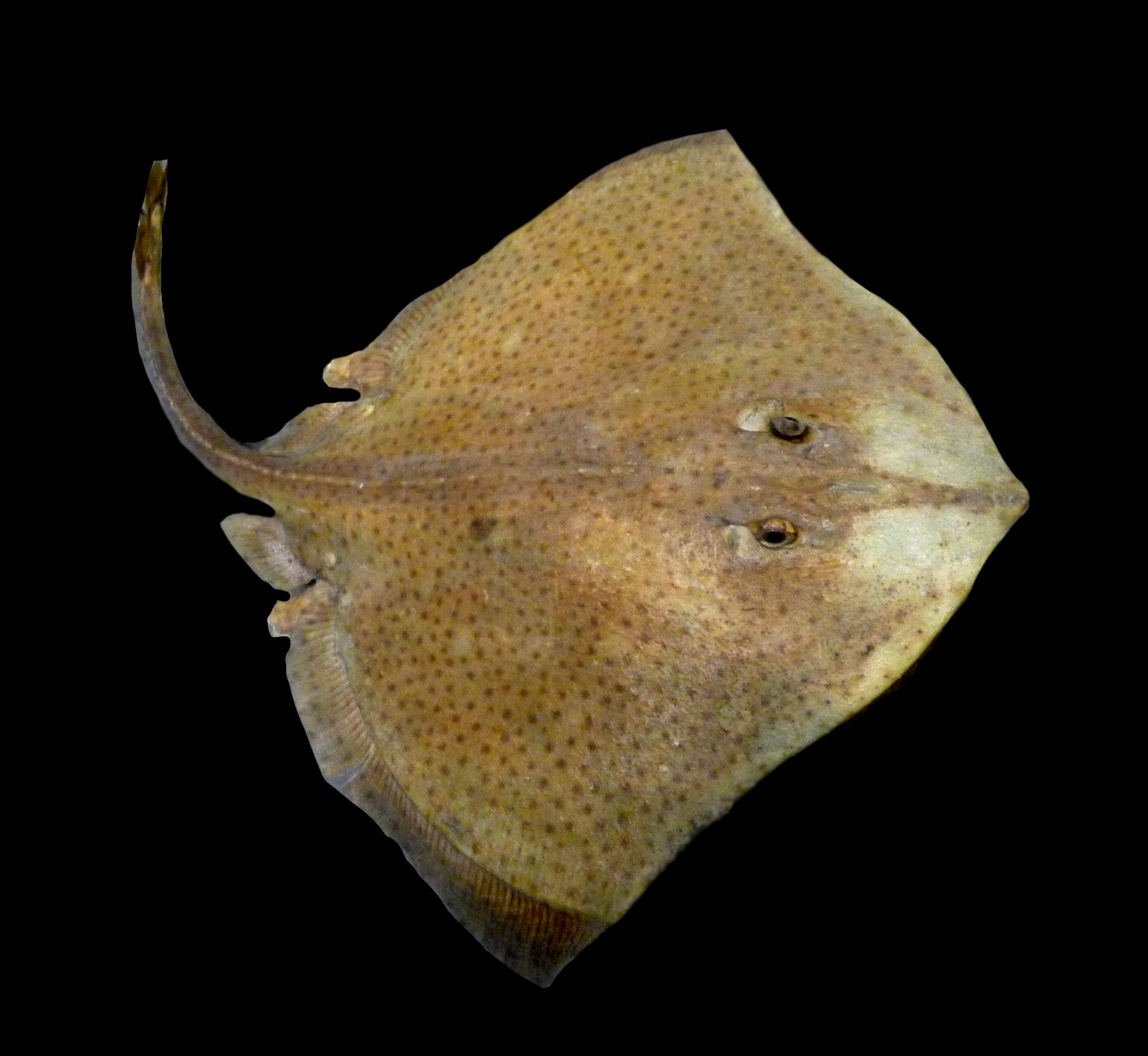 Raie lisse (Raja brachyura)